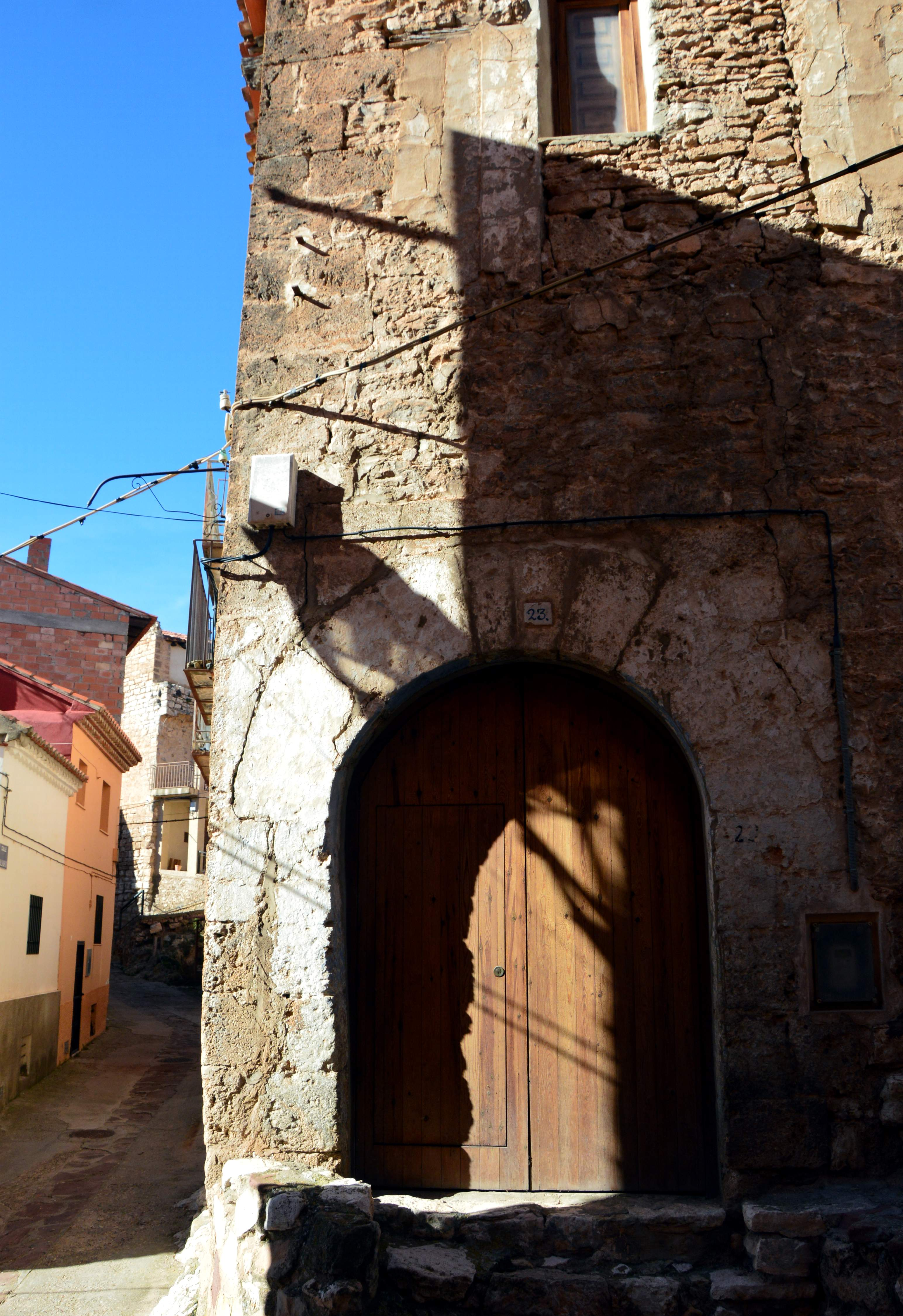 Detalle de acceso con arco de medio punto en Castielfabib (Valencia), correspondiente al paño de muralla de la calle Calvario (2019).